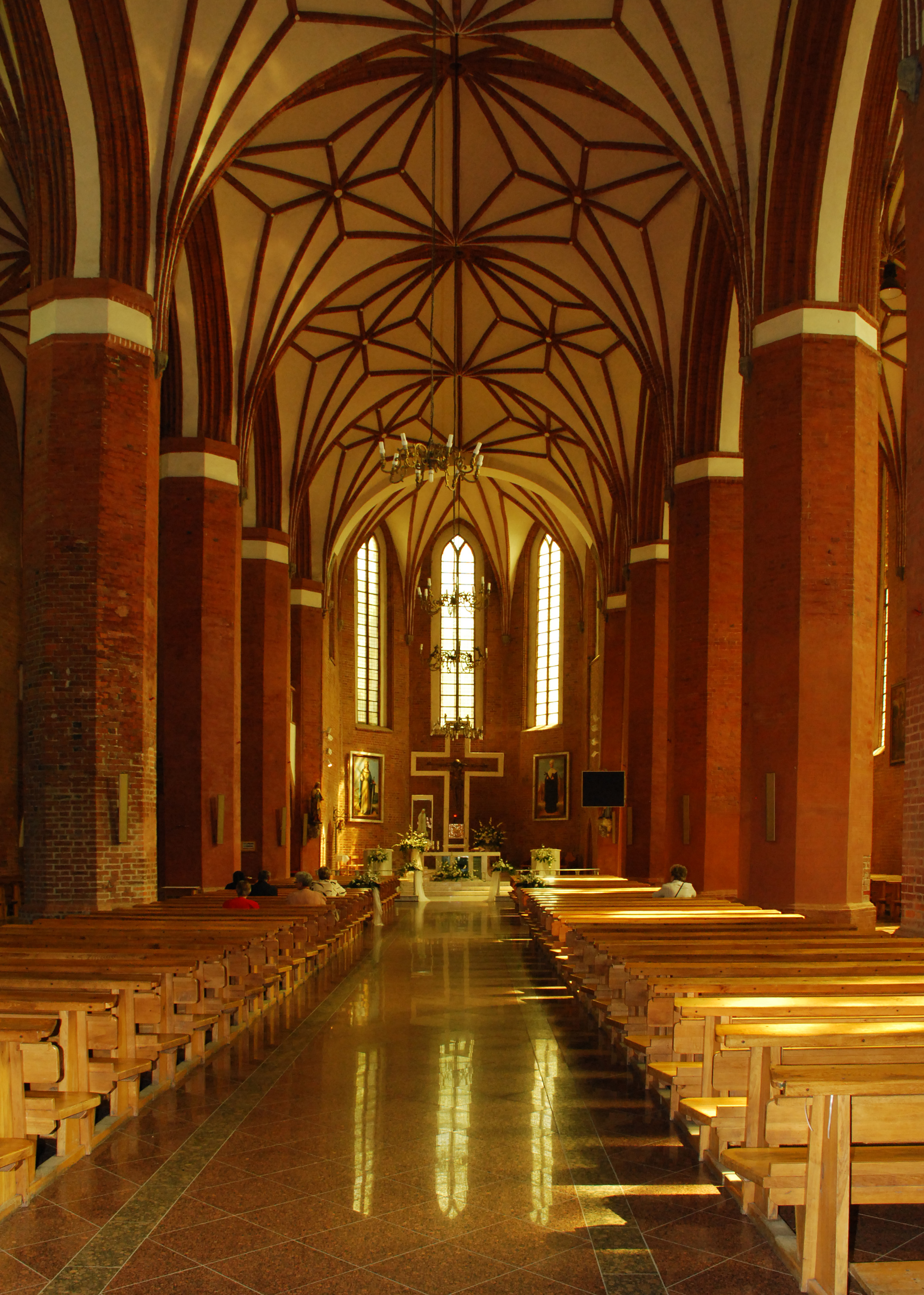 Wnętrze Bazyliki św. Katarzyny z Aleksandrii w Braniewie